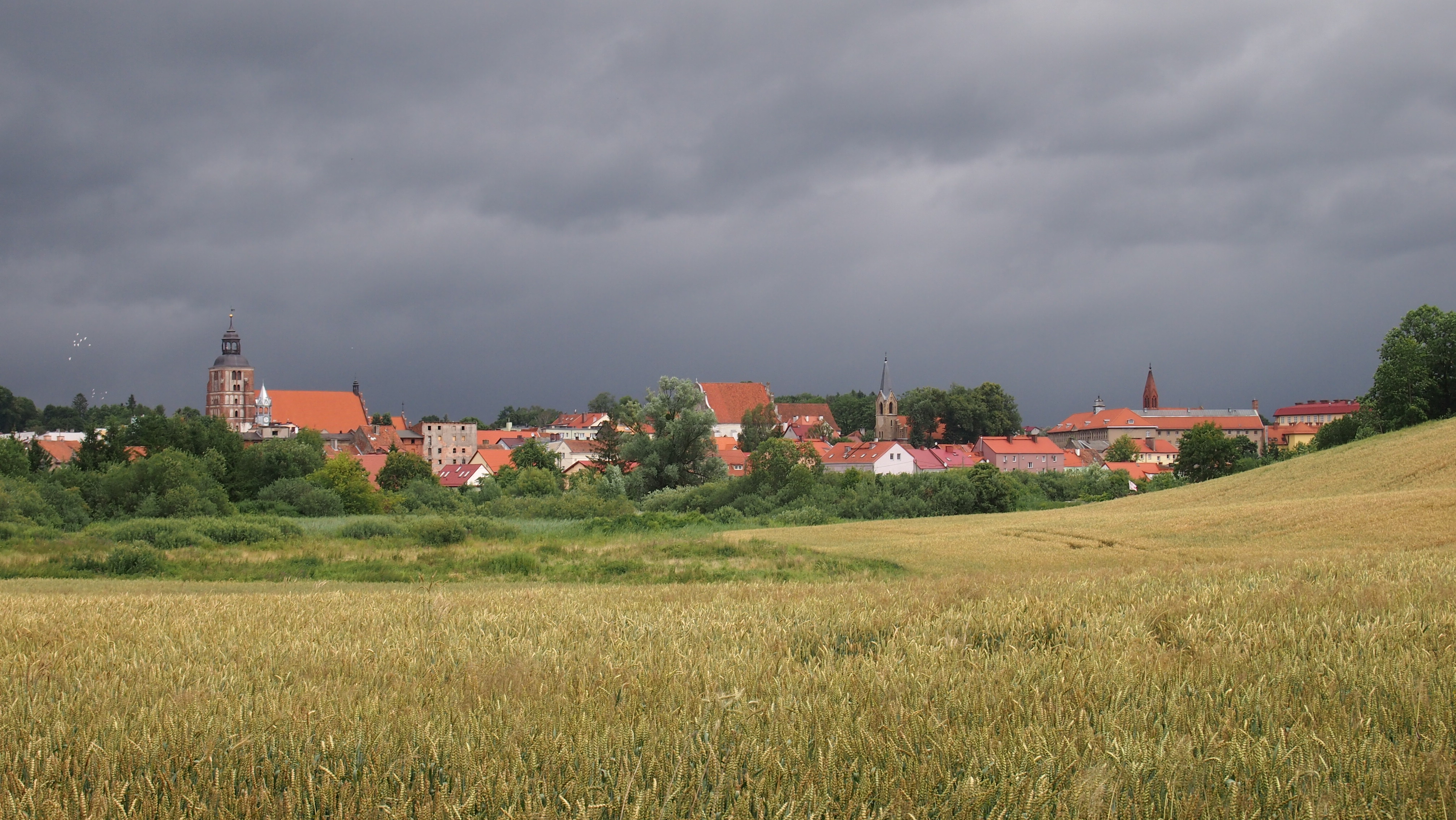 Barczewo, Założenie urbanistyczne starego miasta Wikidata has entry Q31876943 with data related to this item.